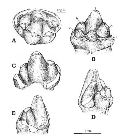 Woutersia butleri sp. n., the quarry of Saint-Nicolas-de-Port, France, ?early Rhaetian, holotype, lower right molar SNP 517 in occlusal (A), lingual (B), labial (C), anterior (Dl, and posterior (E) views. The white surfaces correspond to abrasion or wear; letters denote cusps.